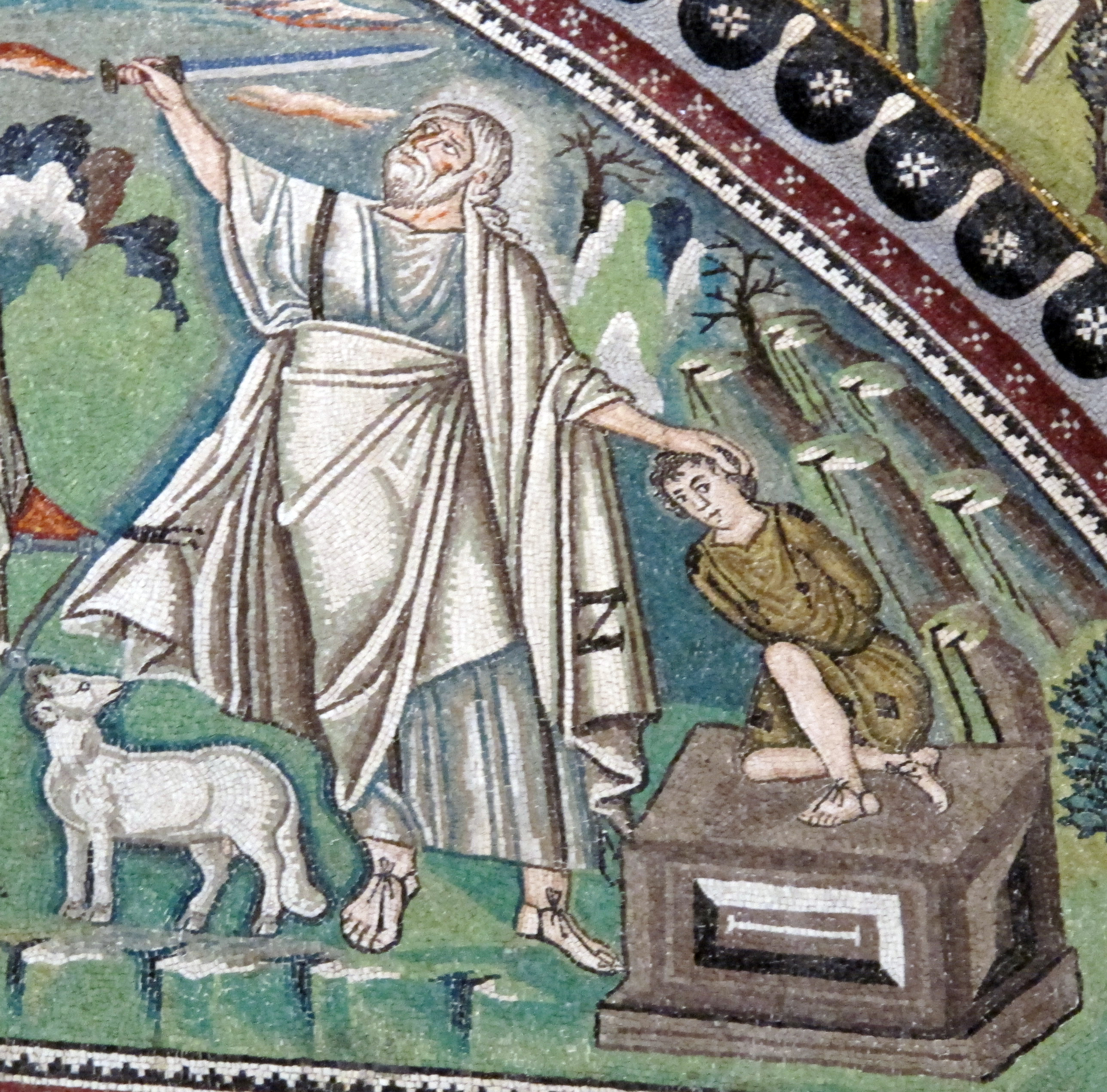 Basilica di San Vitale - MIBAC This is a photo of a monument which is part of cultural heritage of Italy.